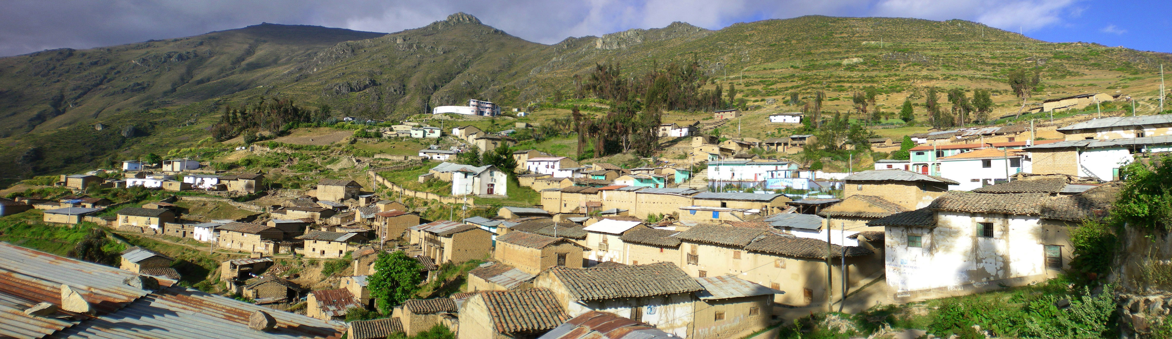 El pueblo deCochapetí